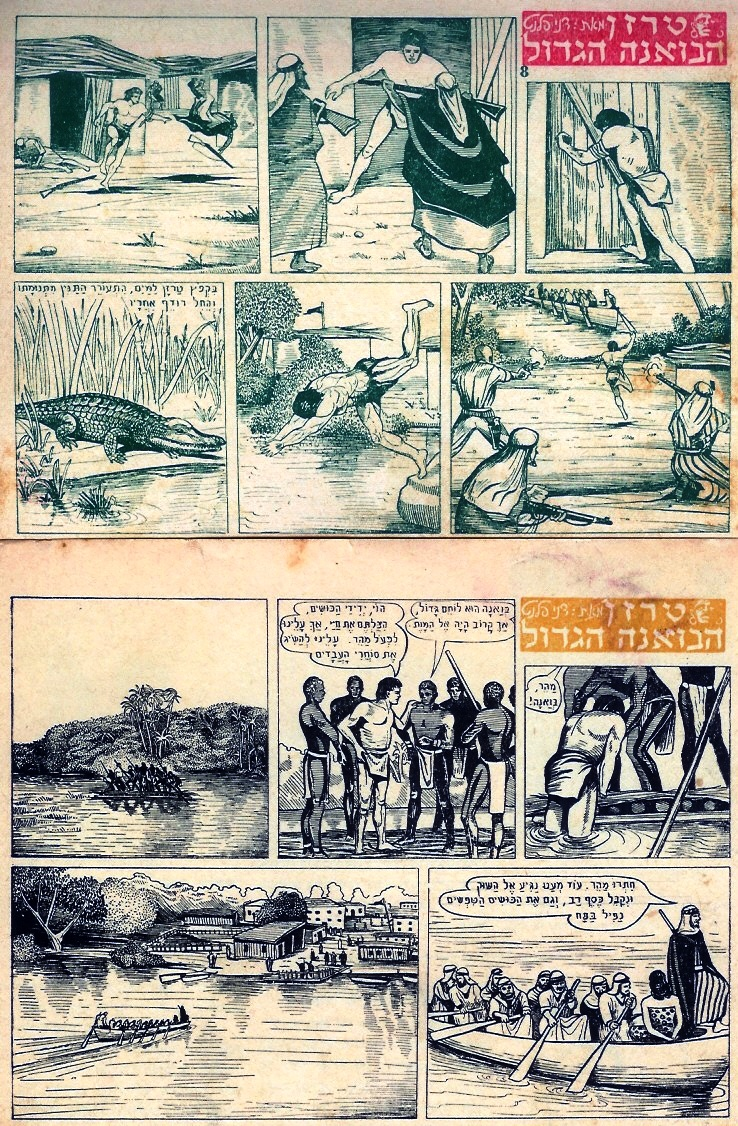 קומיקס של דניאל פלנט סופר, גרפיקאי, מאייר, וצייר קומיקס.